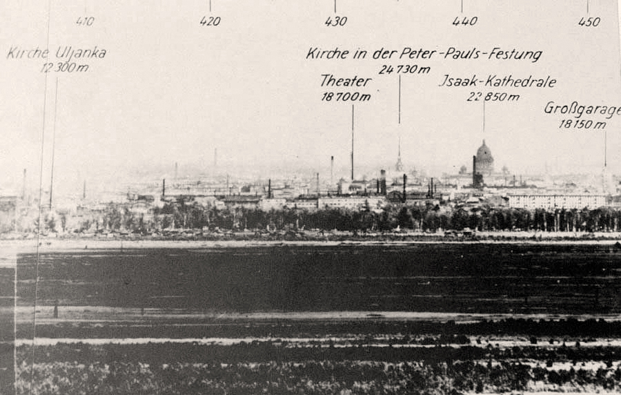 Панорама Ленинграда. Сделана немецким артиллерийским корректировщиком-наблюдателем с Вороньей горы. 1942 или 1943 год.